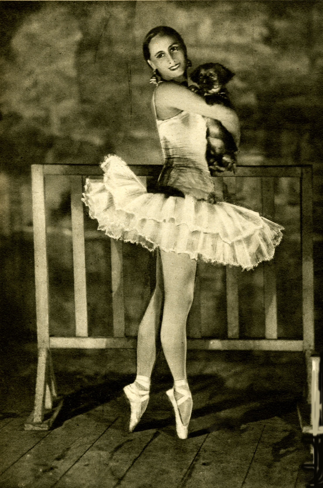 Anna Pavlova ballerina in una foto degli anni 20